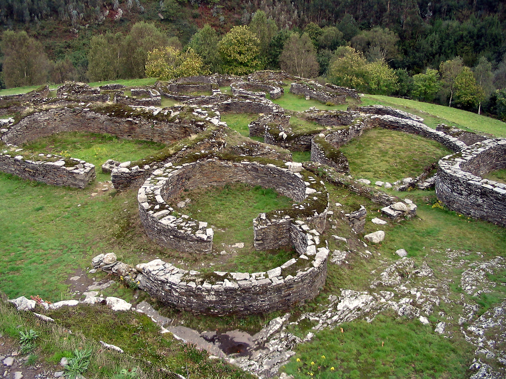 Keltensiedlung Castro de Coana in Asturien